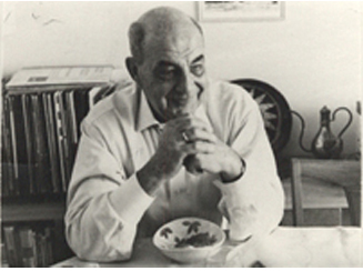 נחמן פוזנר